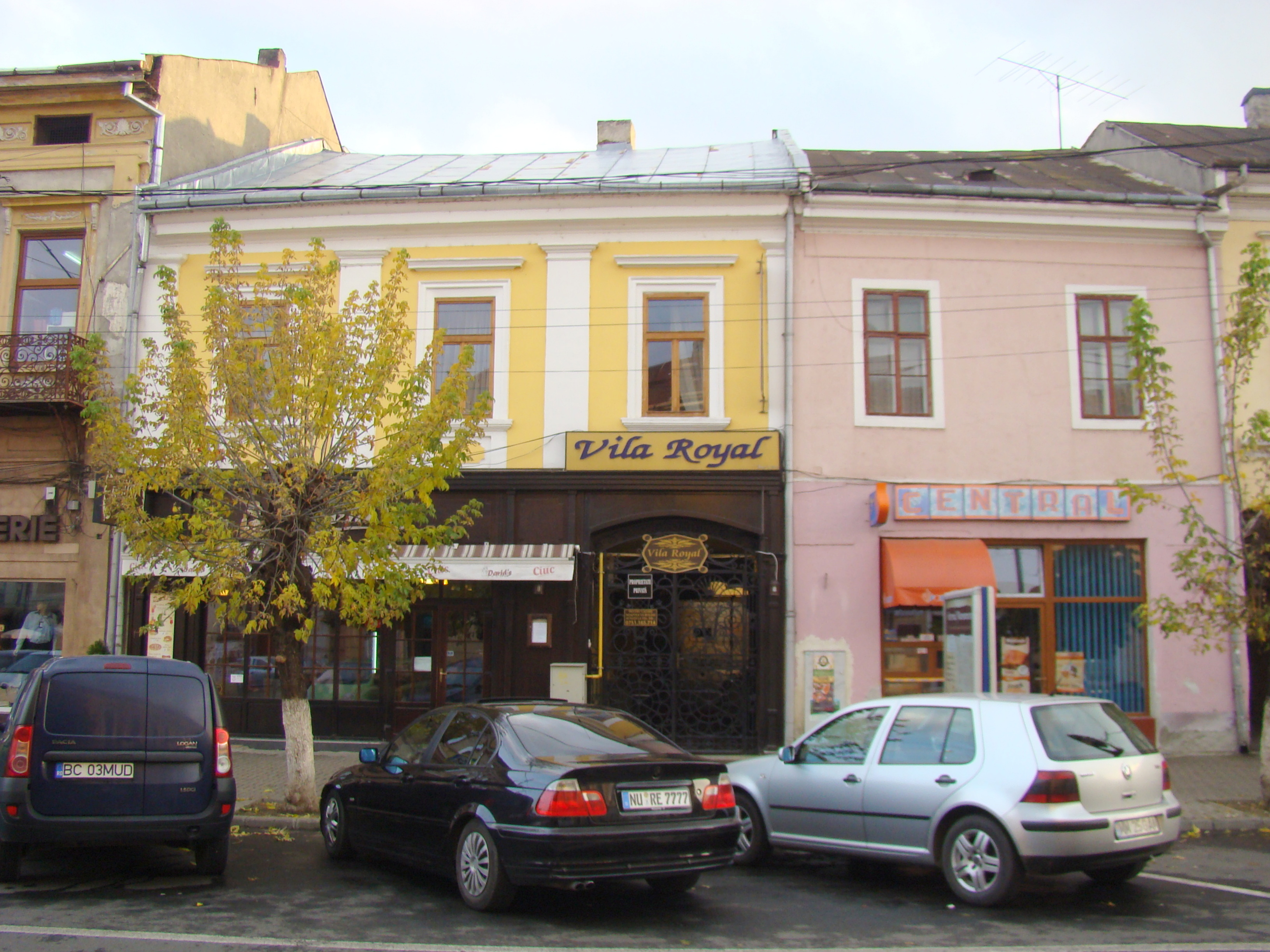 Casă cu spații comericale la parter, municipiul Sighetu Marmației, Str. Mihaly Ioan de Apșa 1